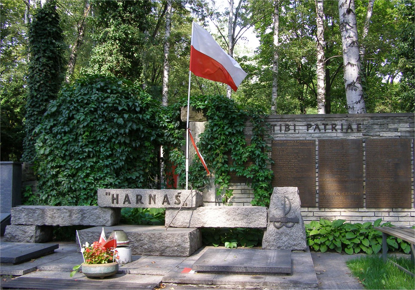 Powązki wojskowe w Warszawie (fot Zu)